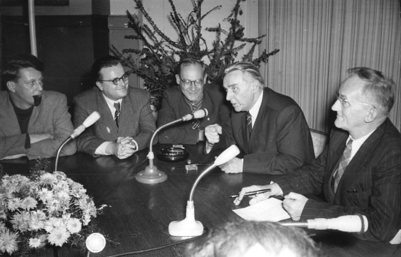 Zentralbild Quasch. 22.10.1954 Treffen Deutscher und Sowjetischer Schriftsteller und Wissenschaftler. Am 22.10.1954 trafen sich auf Einladung des Schriftstellerverbands der DDR und der Gesellschaft für Deutsch-Sowjetische Freundschaft im Plenarsaal der Akademie der Künste in Berlin deutsche und sowjetische Schriftsteller und Wissenschaftler zu einer Aussprache. UBz: Es spricht der sowjetische Schriftsteller Konstantin Fedin (2.v.r.) (links) Nationalpreisträger Stephan Hermlin, Just und Braun (rechts) Kurella.